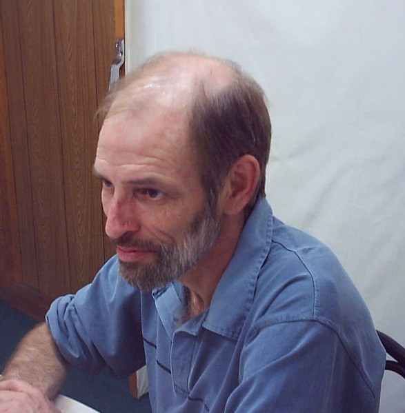 Fotografía del político uruguayo Alejandro Atchugarry